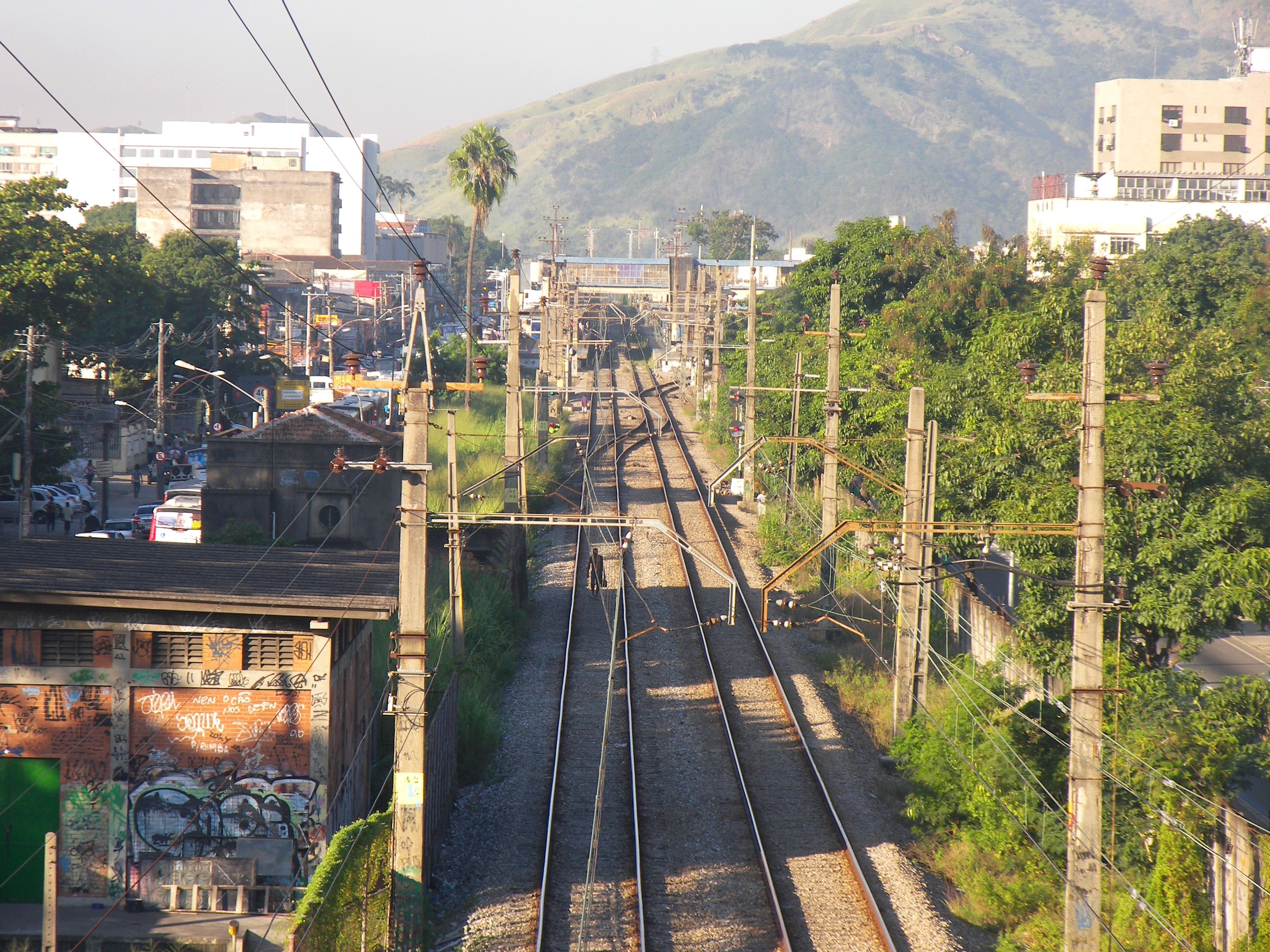 Campo Grande, Rio de Janeiro, visto a partir do Viaduto Prefeito Alim Pedro